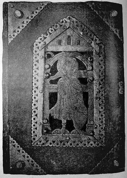 Вокладка Лаўрышаўскага Евангелля (13 ст.), якое, магчыма, перапісана на Валыні на заказ вял.кн. Войшалка. На вокладцы бронзавая выява (16-17 ст.) св. Дзмітрыя Салунскага, якую са слоў В.У. Ластоўскага часта лічаць выявай вял.кн. Войшалка.